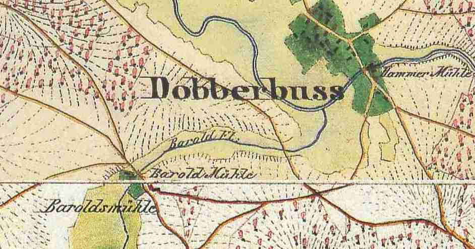 Baroldmühle, Wohnplatz im Ortsteil Doberburg der Stadt Lieberose, Lkr. Dahme-Spreewald, Brandenburg, Deutschland, kombinierte Ausschnitte aus den Urmesstischblättern Trebatsch 3951 und Lieberose 4051 von 1846